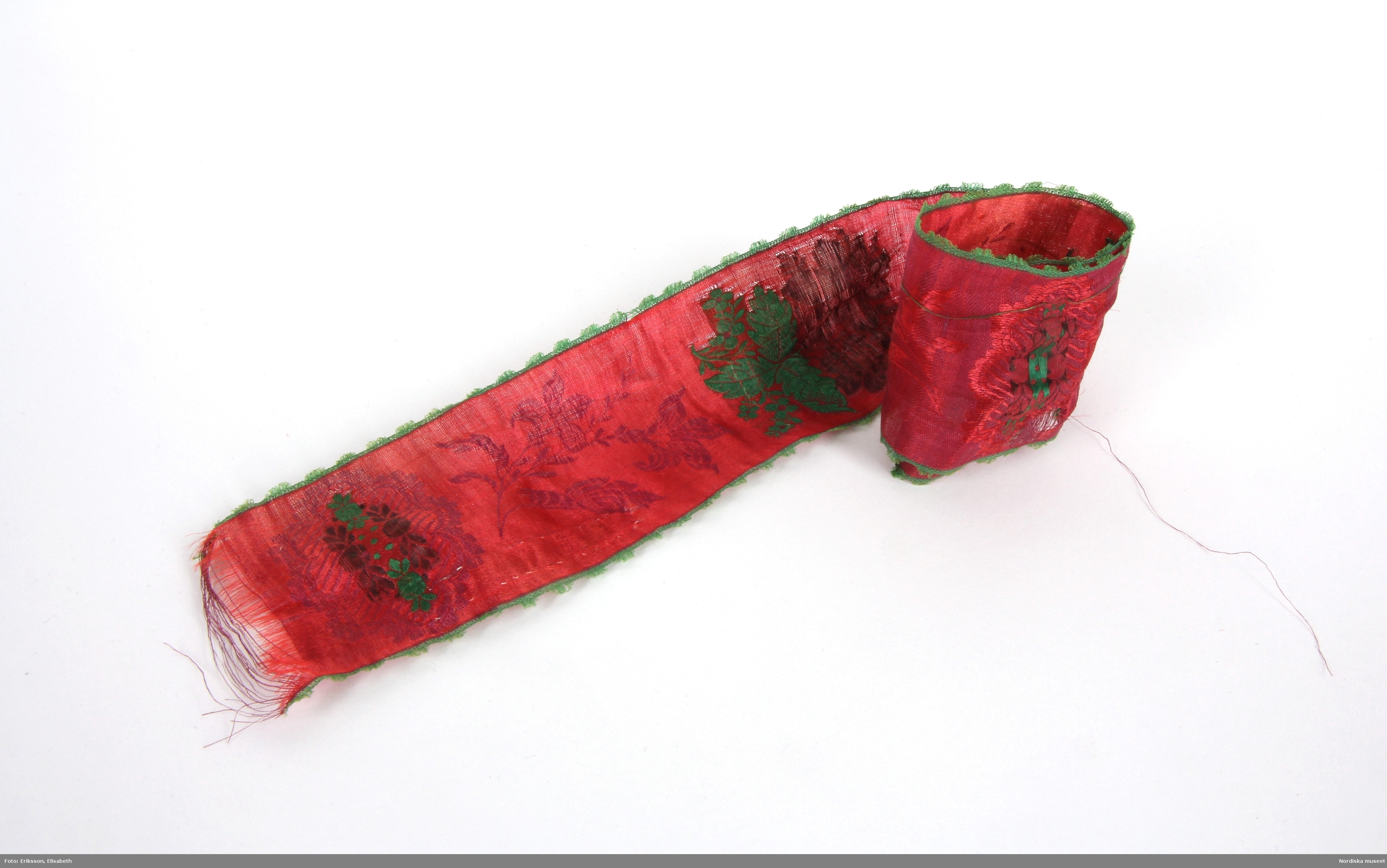 Band